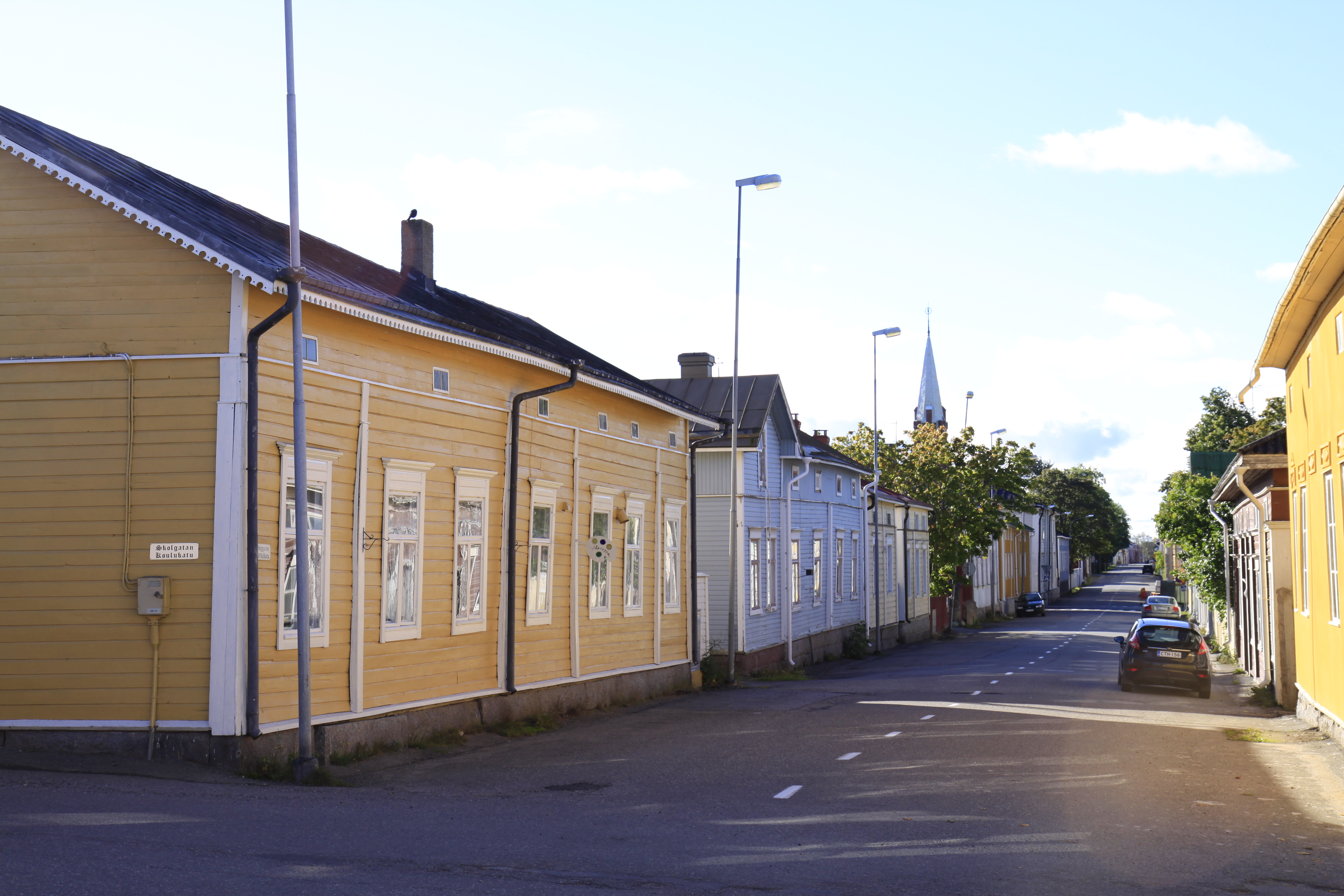 Kristiinankaupungin ruutukaava-alue; kaupunkimaisema Kristiinankaupungissa